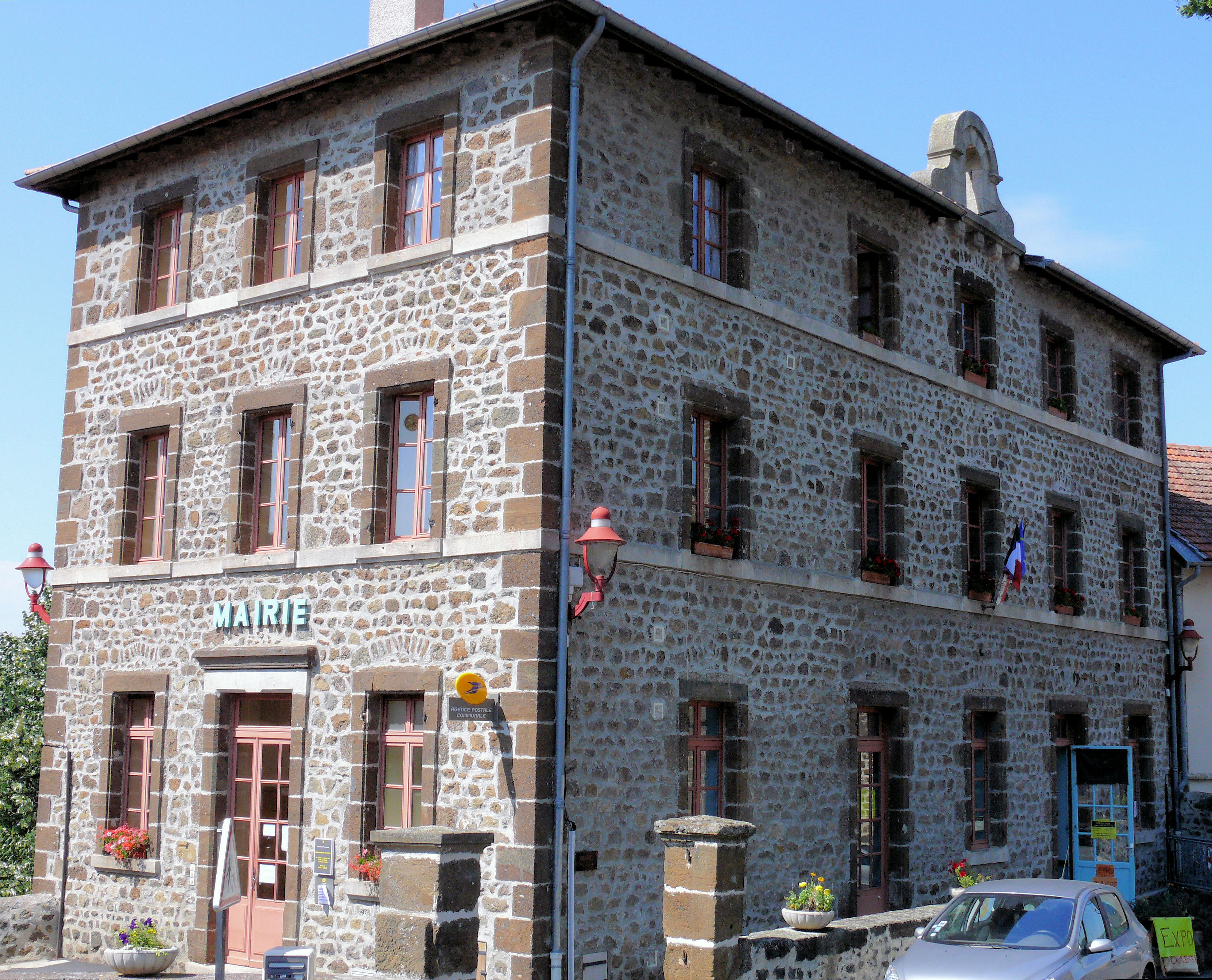 Polignac - Mairie, à côté de l'église